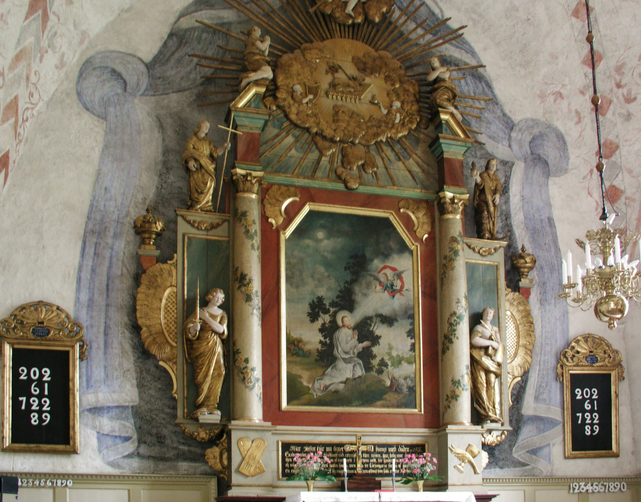 Gärdslösa kyrka/church. Altar.